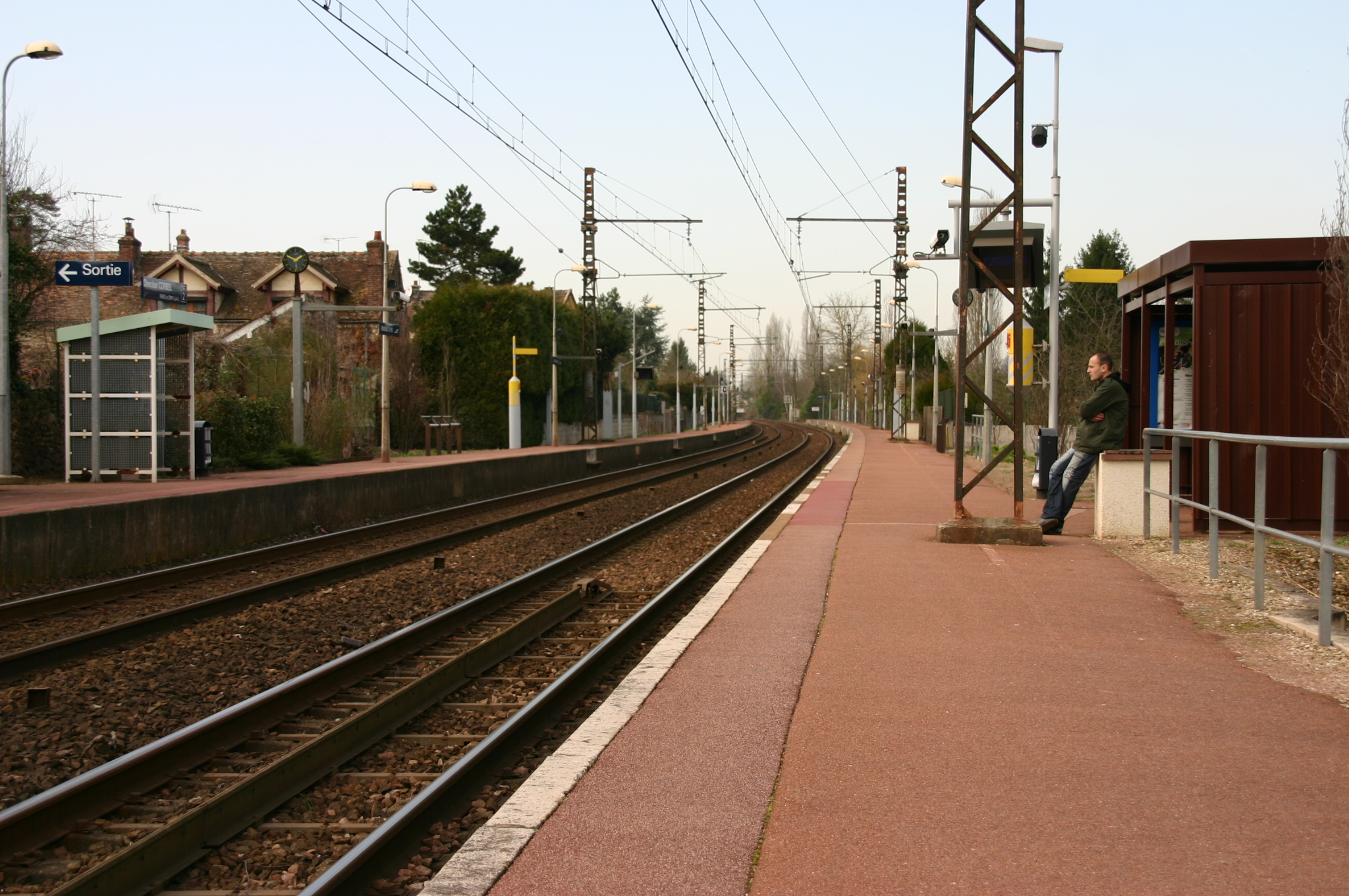 La gare de Boissise-le-Roi, Boissise-le-Roi, département de la Seine-et-Marne (France)